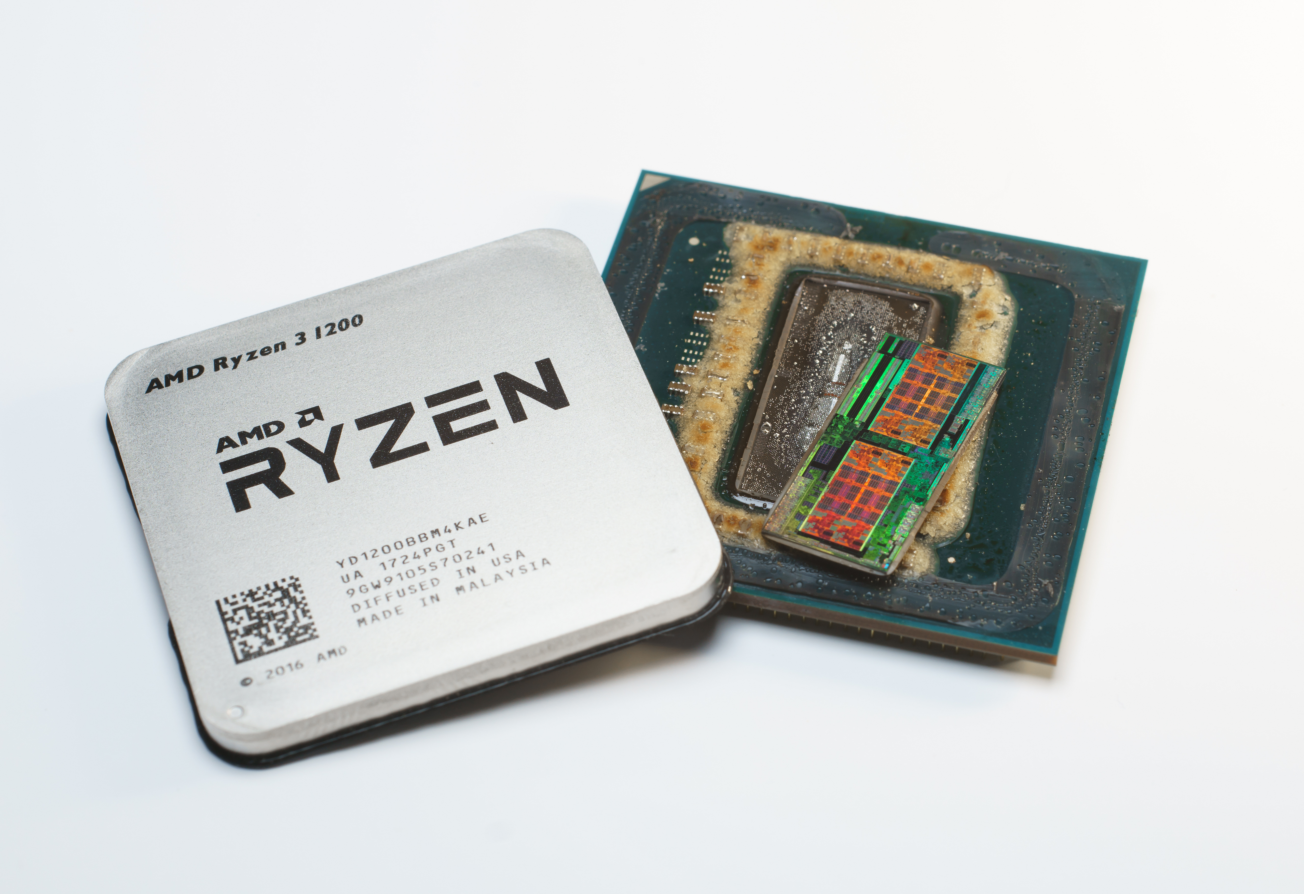 etched